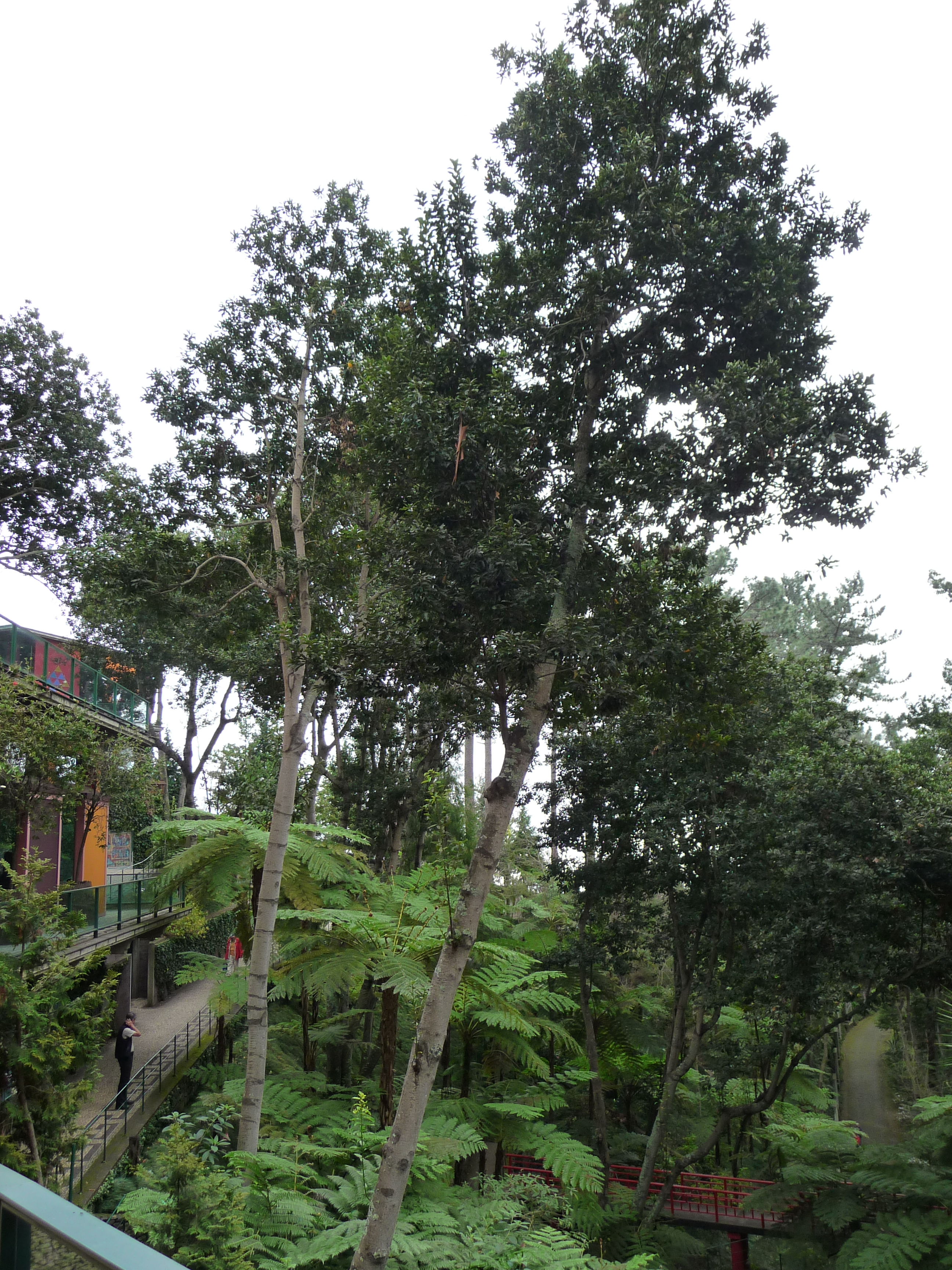 Kanári babér (Laurus novocanariensis) (Madeira, Monte, Trópusi kert)